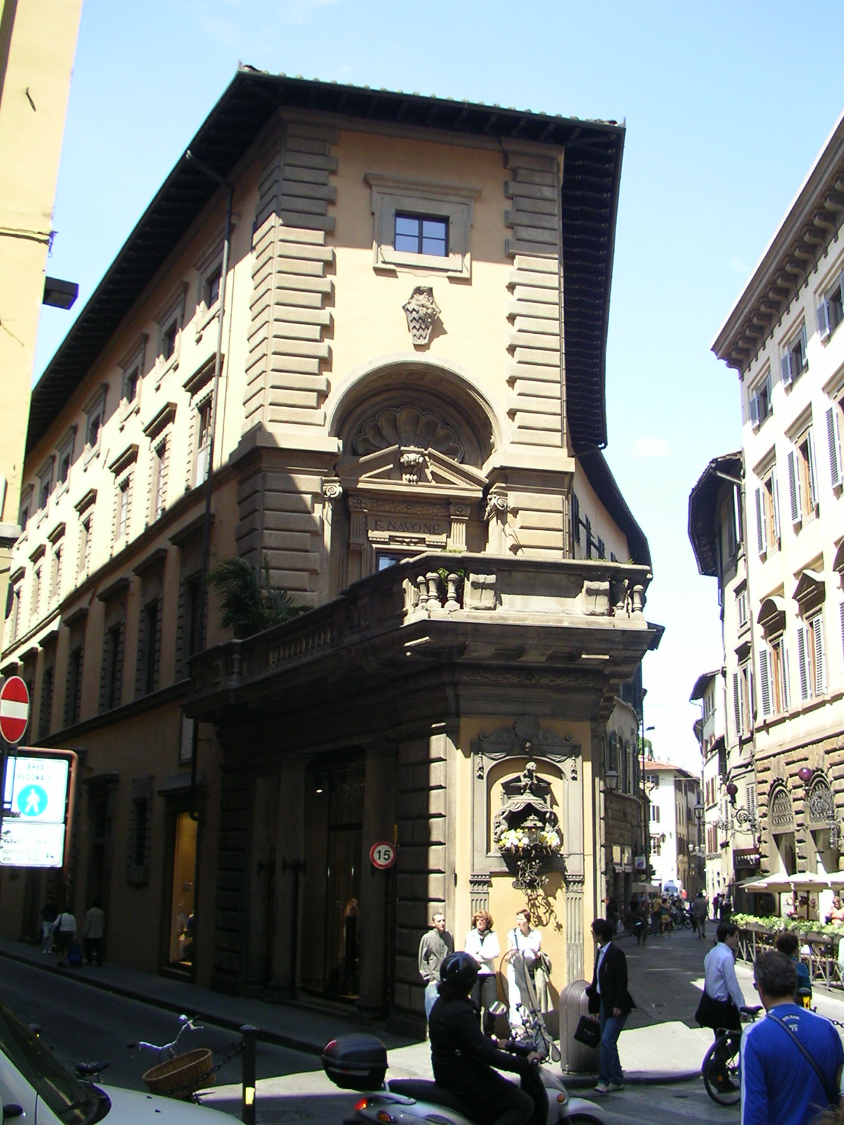 palazzo Dudley Via Tornabuoni in Florence, Italy